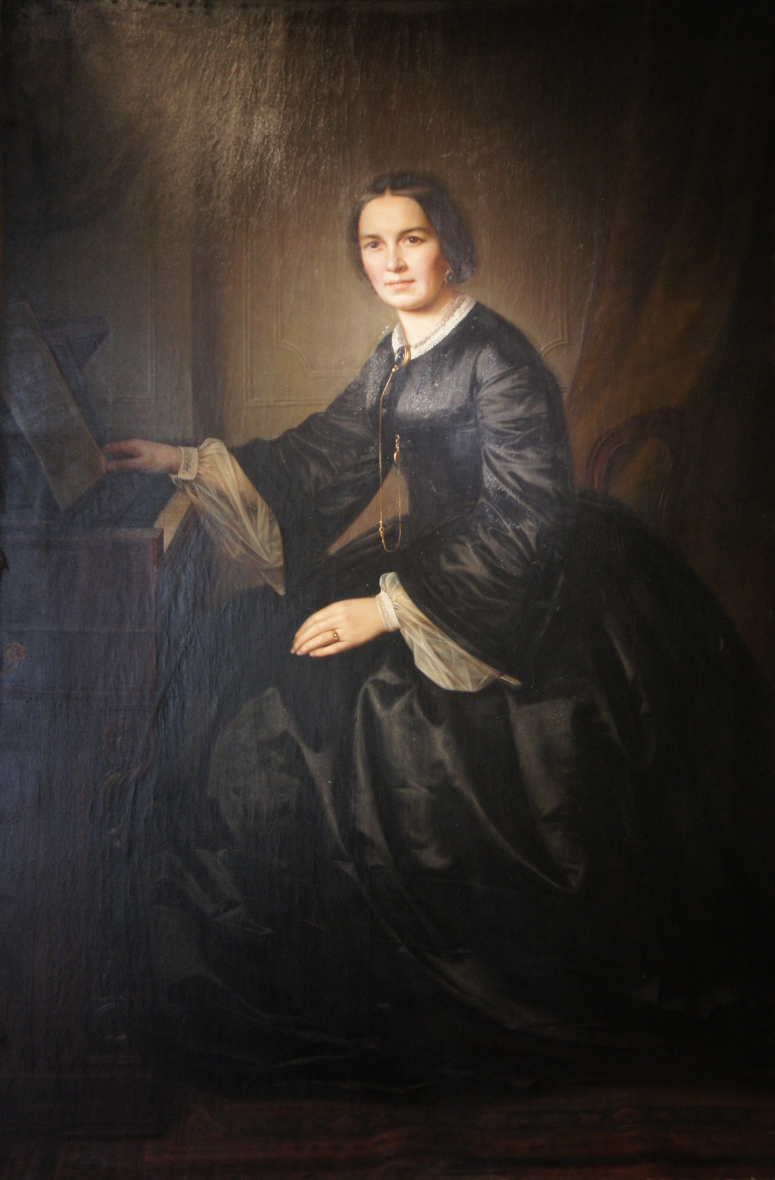 Anna Camilla Thieme (1826-1894), Gattin des Malers Gotthold Theodor Thieme (1823-1901) . Öl auf Leinwand. Gemälde im Kulturhistorischen Museum, Neißstraße 30 in Görlitz